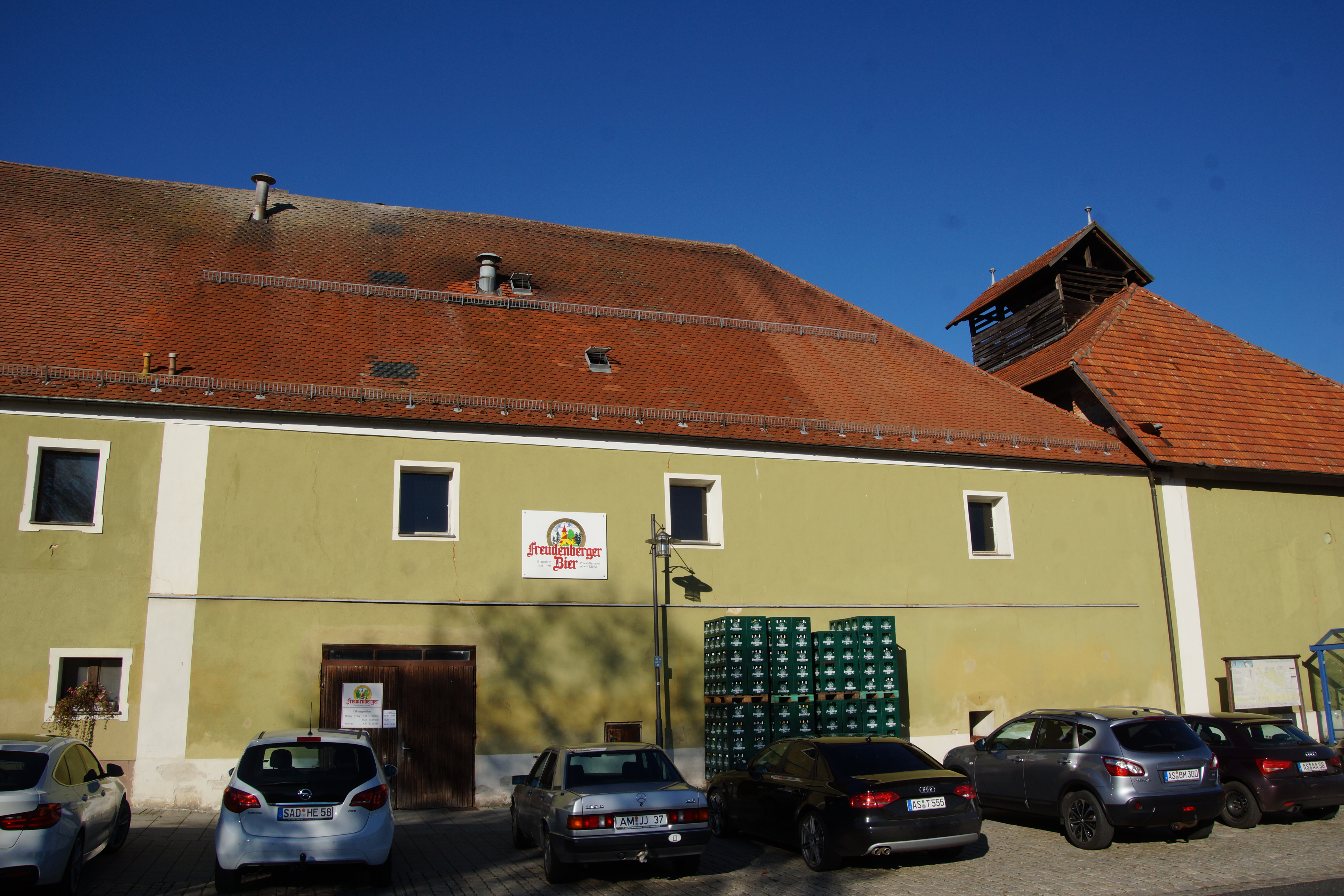 Freudenberg